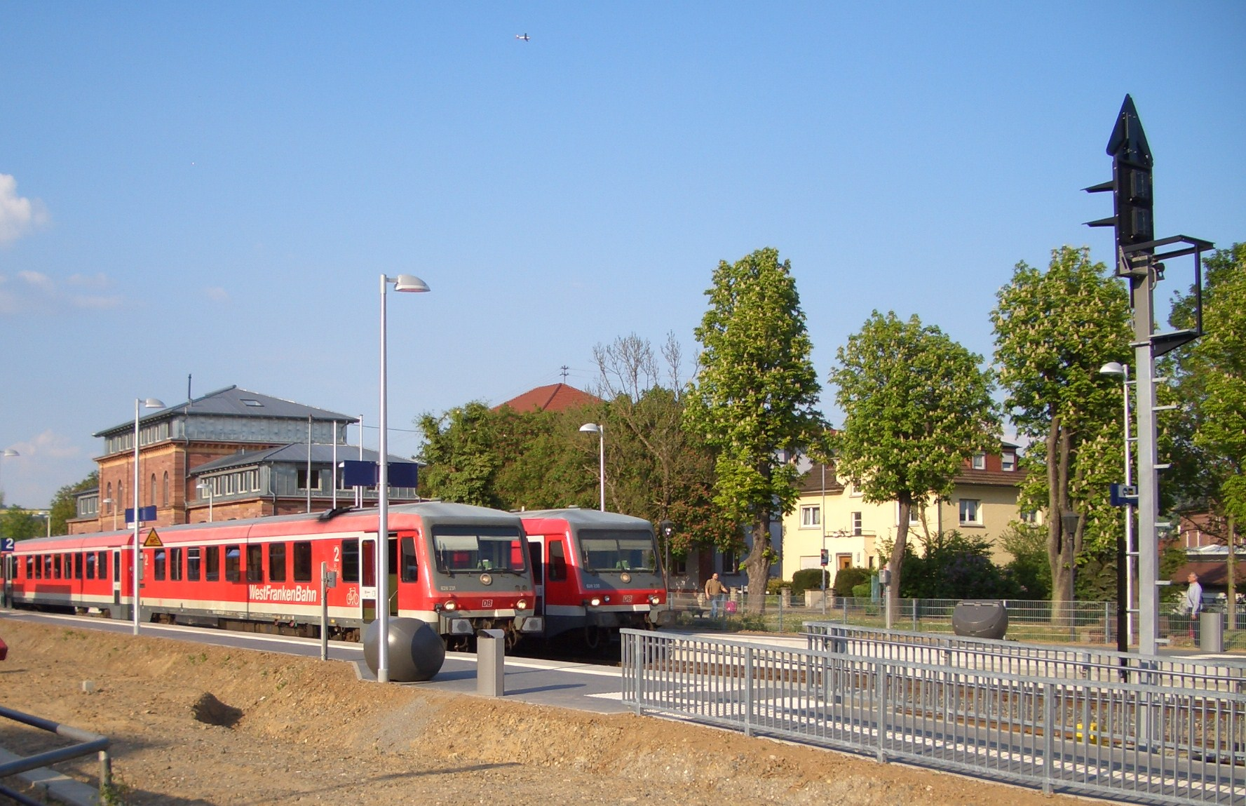 Bahnhof nach Umbau hier: Sichtvon der anderen Gleisseite